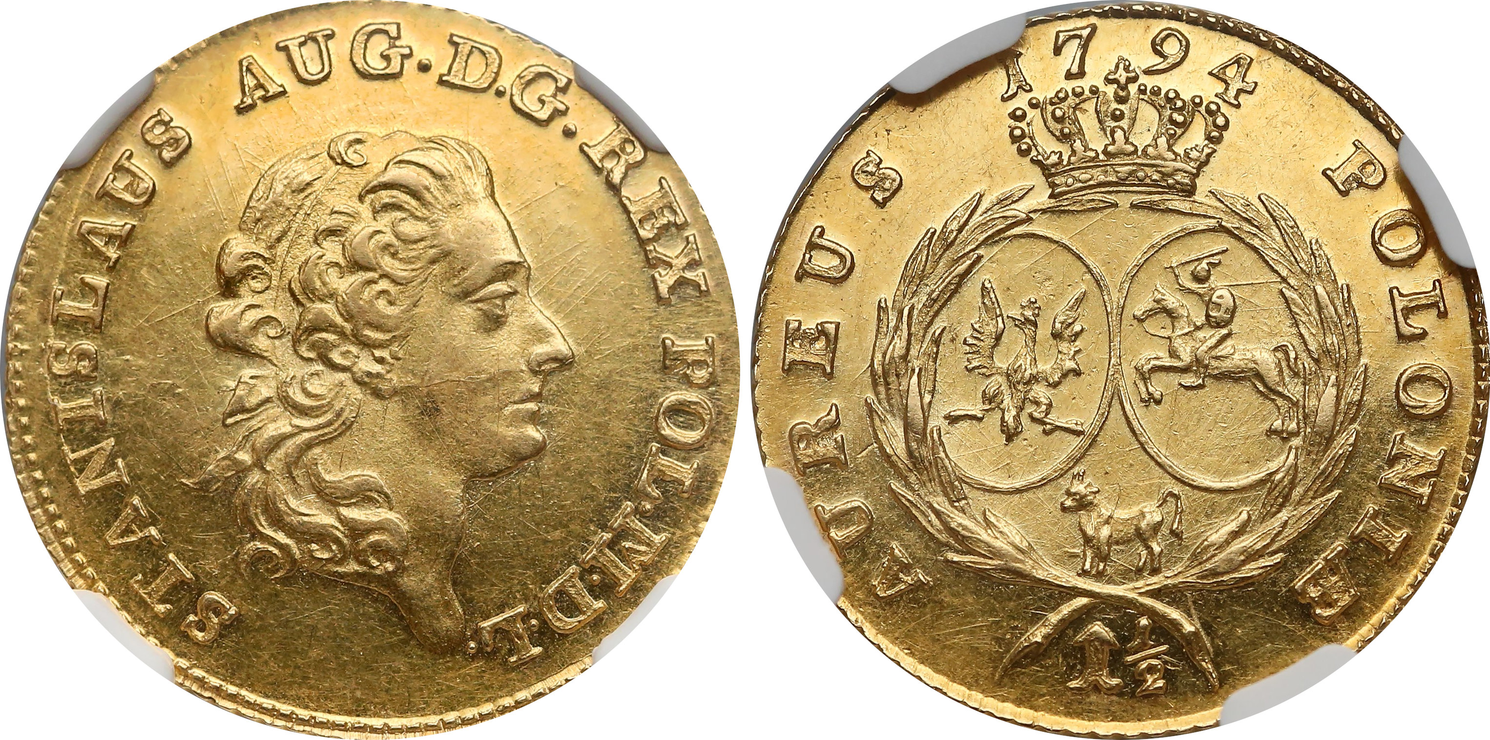 Półtora dukata 1794